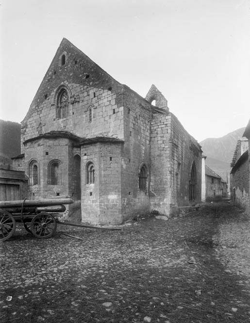 Imatge